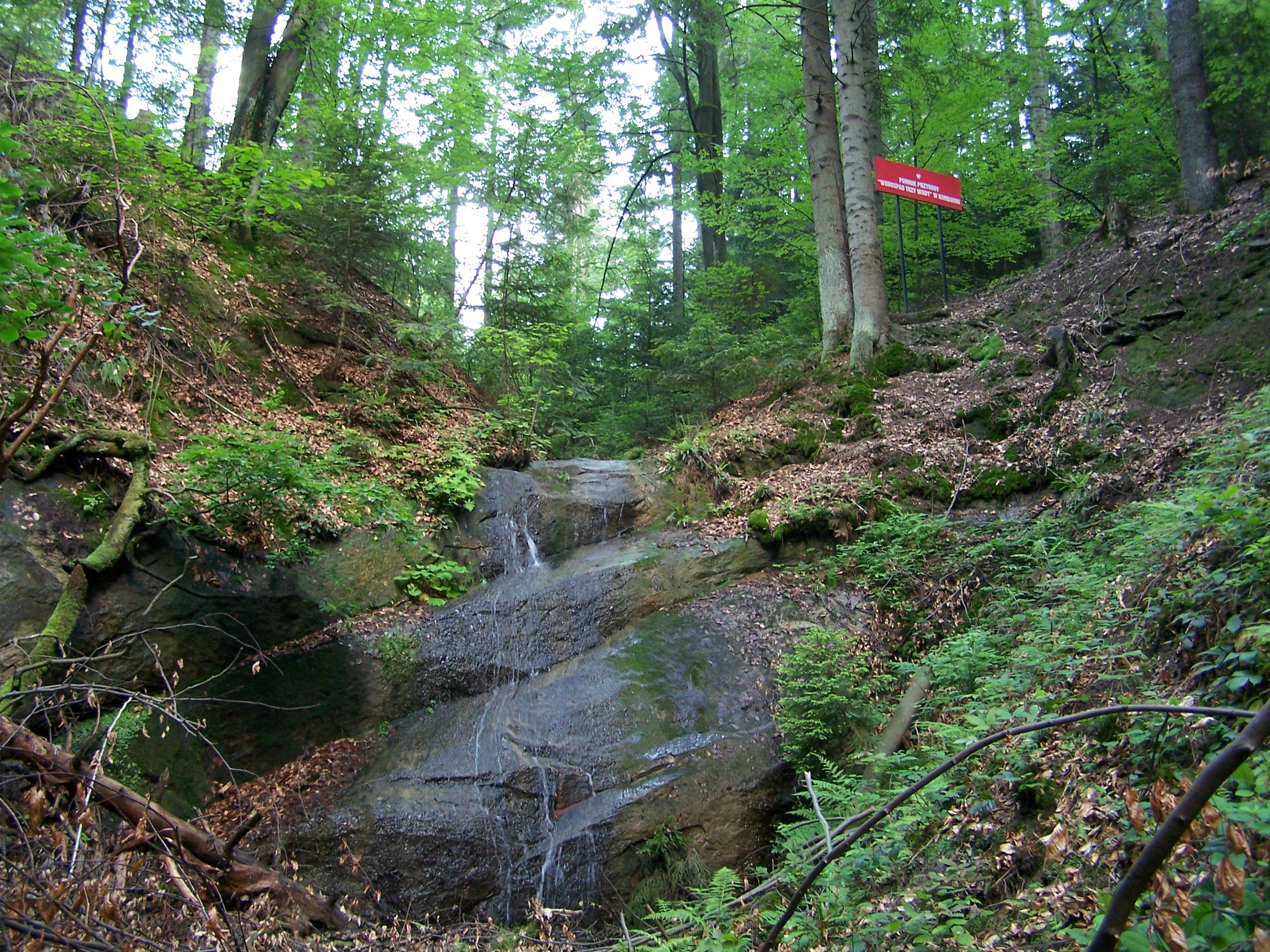 Waterfall Trzy Wody Kombornia Poland